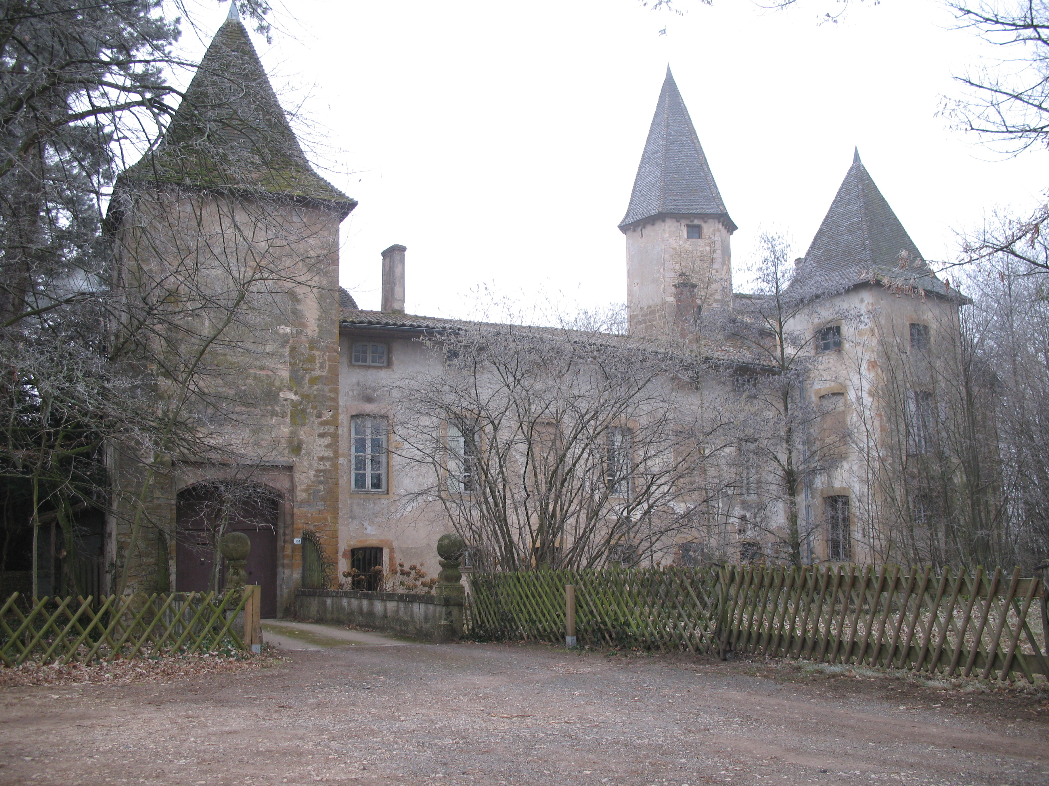 château d'Estours - Crèches-sur-Saône (Saône-et-Loire)